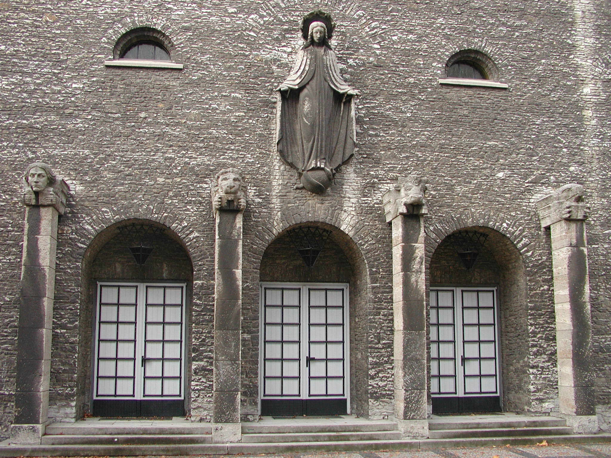 St. Marienkirche in Berlin-Karlshorst